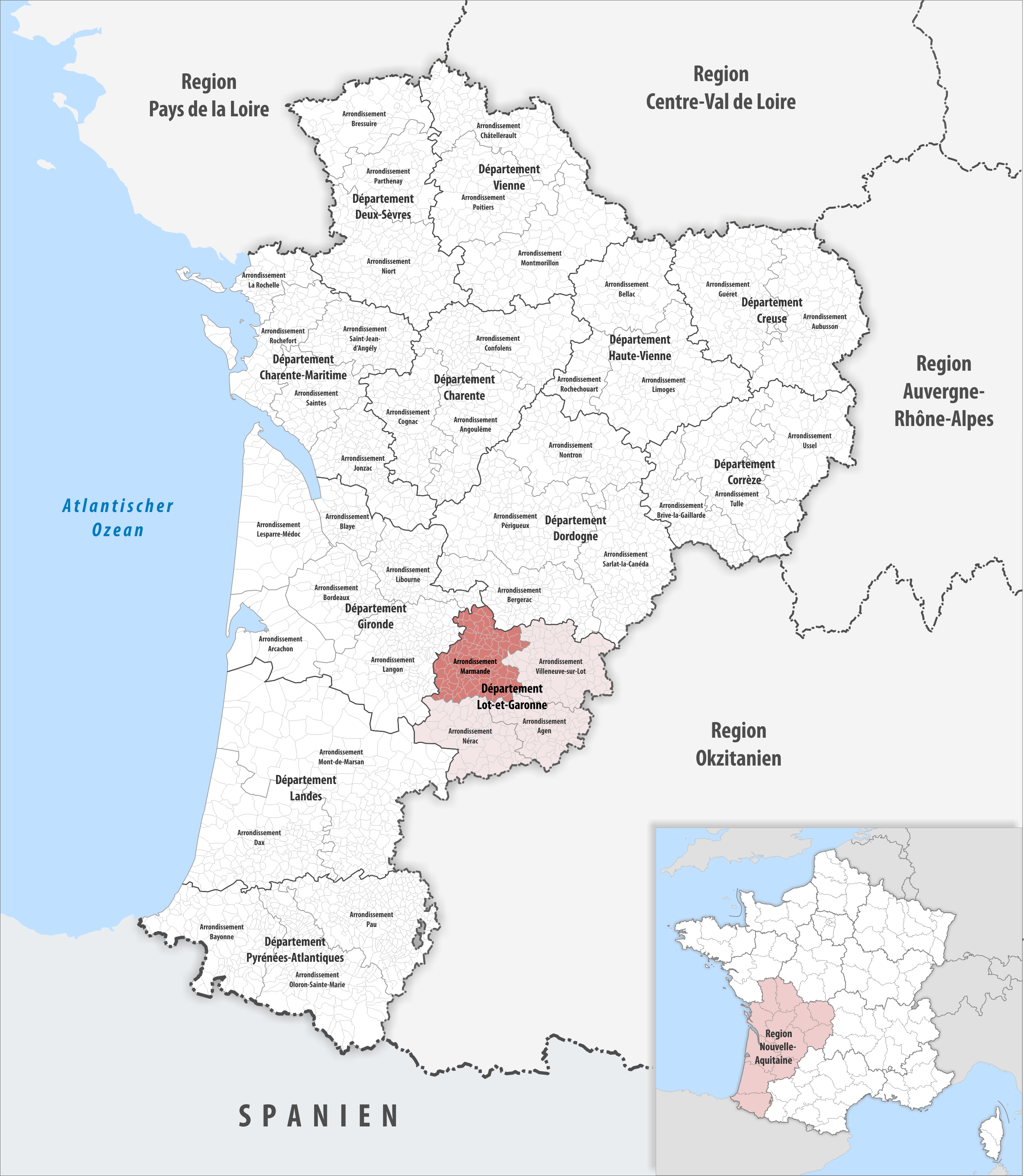 Lage des Arrondissements Marmande